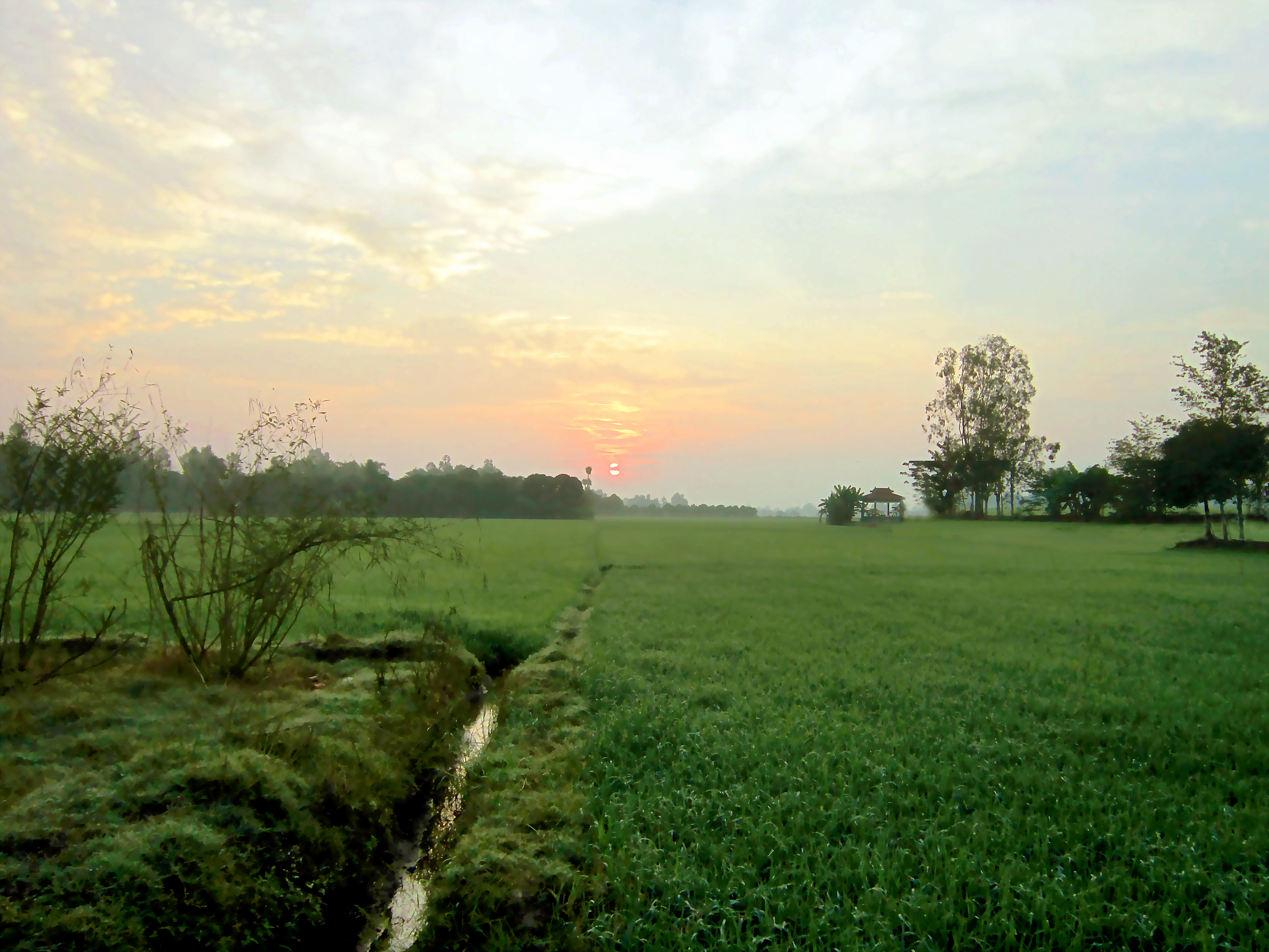 Một cánh đồng lúa ở xã Hòa Bình, thuộc huyện Chợ Mới, tỉnh An Giang, Việt Nam.